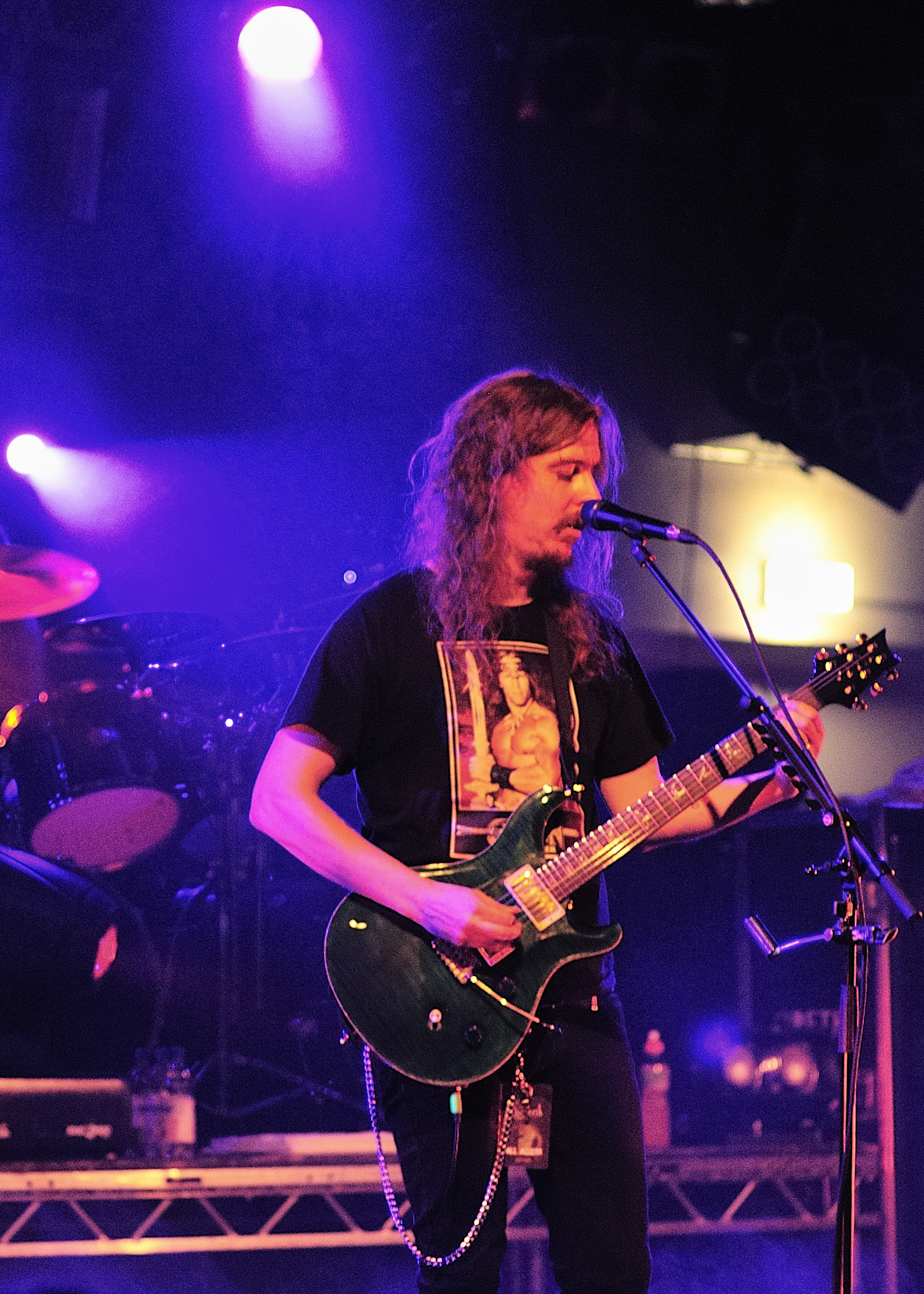 Opeth, Munich Backstage Werk, Saturday 6 December 2008 Mikael Åkerfeldt